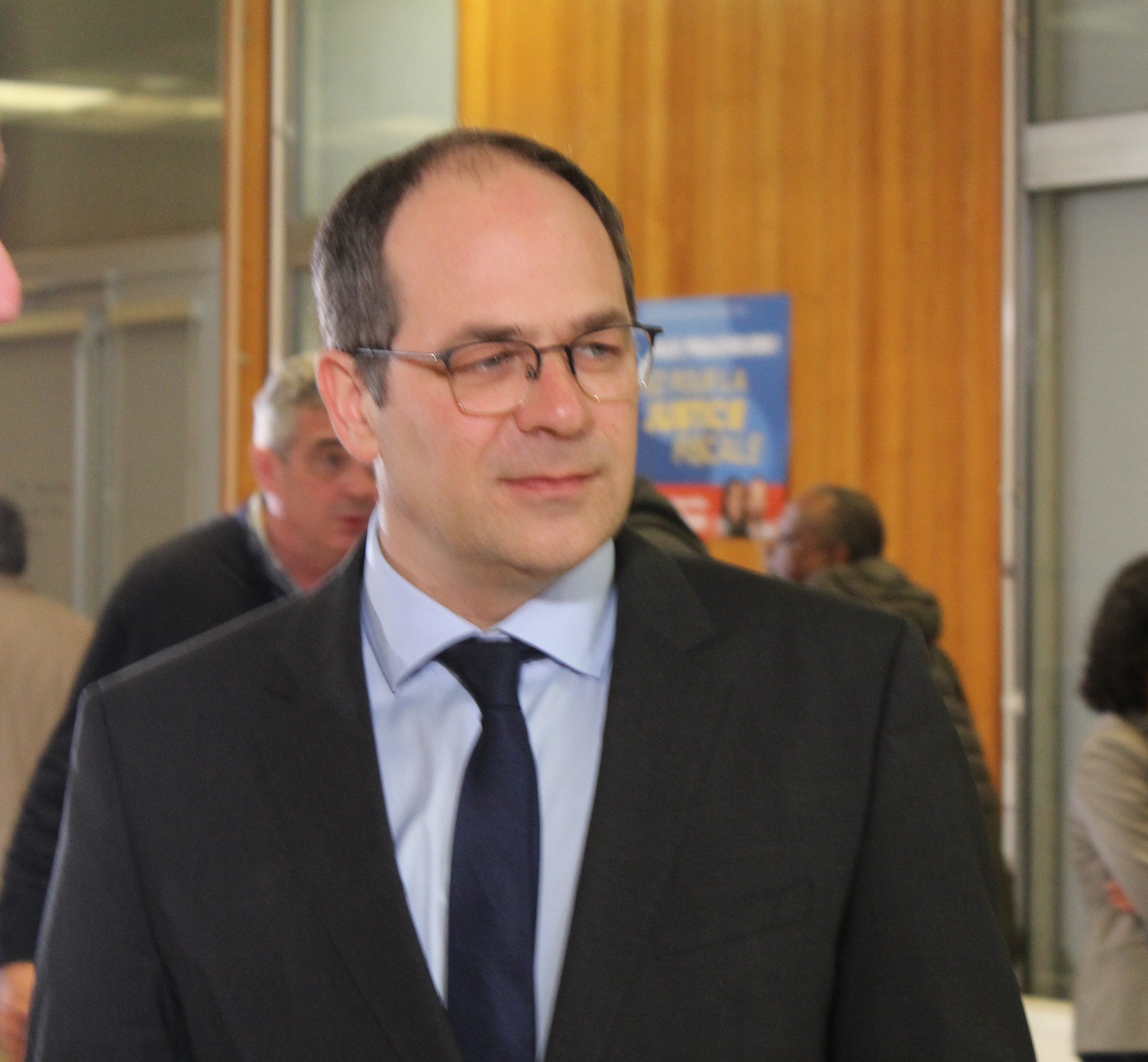 Meeting de La France insoumise à Nevers (Nièvre, France) le 24 mars 2019, avec Manon Aubry, Alexis Corbière et Emmanuel Maurel.